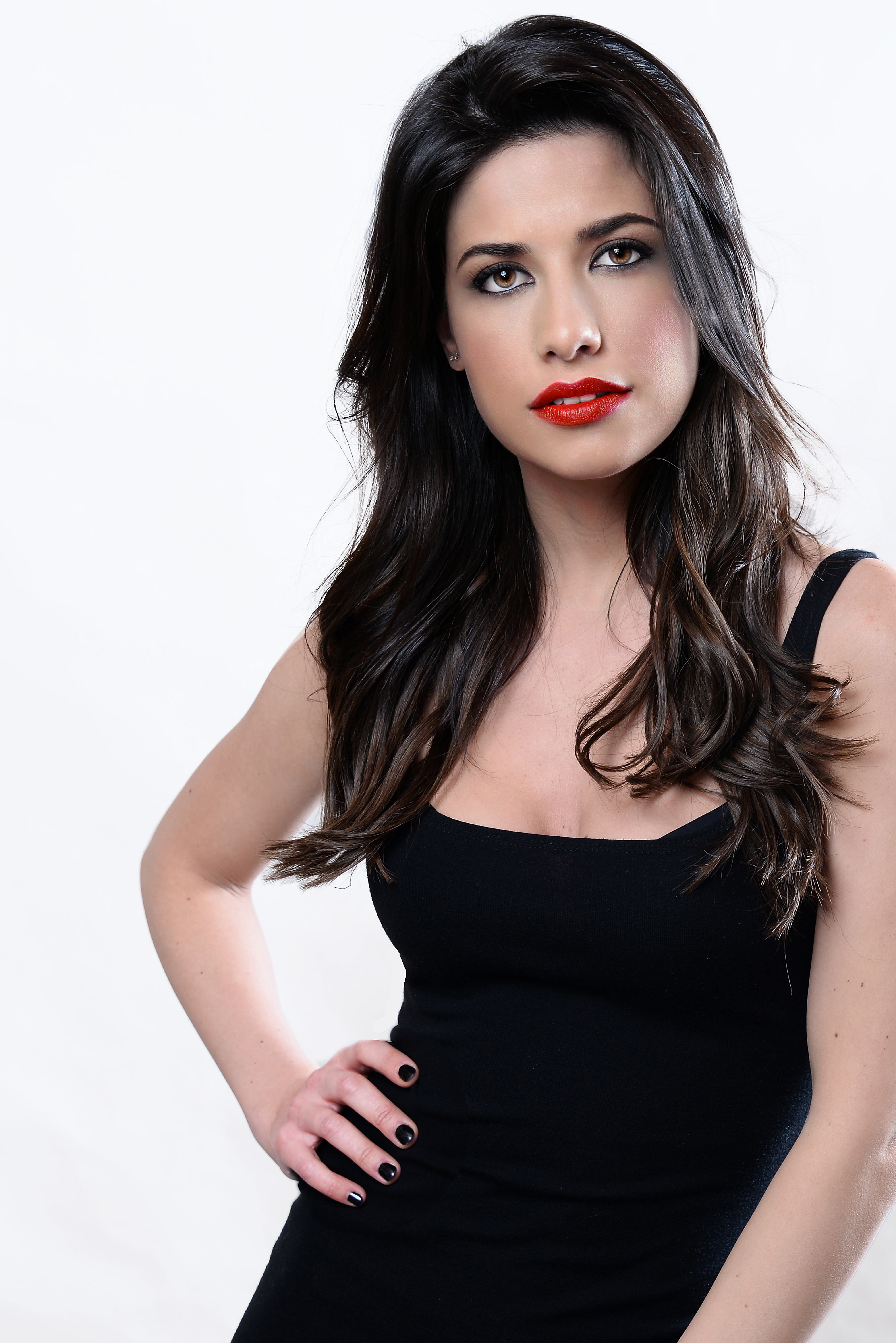 Ares Teixidó